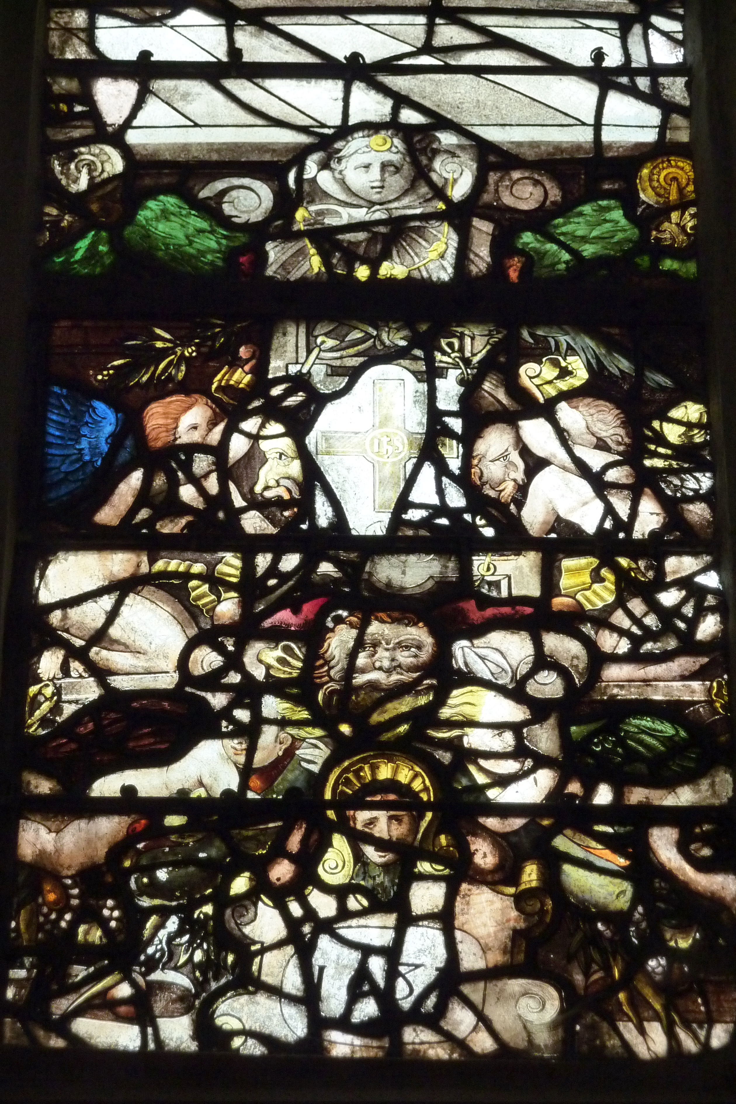 Ausschnitt des Bleiglasfensters Nr. 4 in der katholischen Pfarrkirche Saint-Acceul in Écouen (siehe Mathieu Lours: Saint-Acceul d'Écouen. Une cage de verre en pays de France, éditée par l’Association Les Amis de Saint-Acceul)